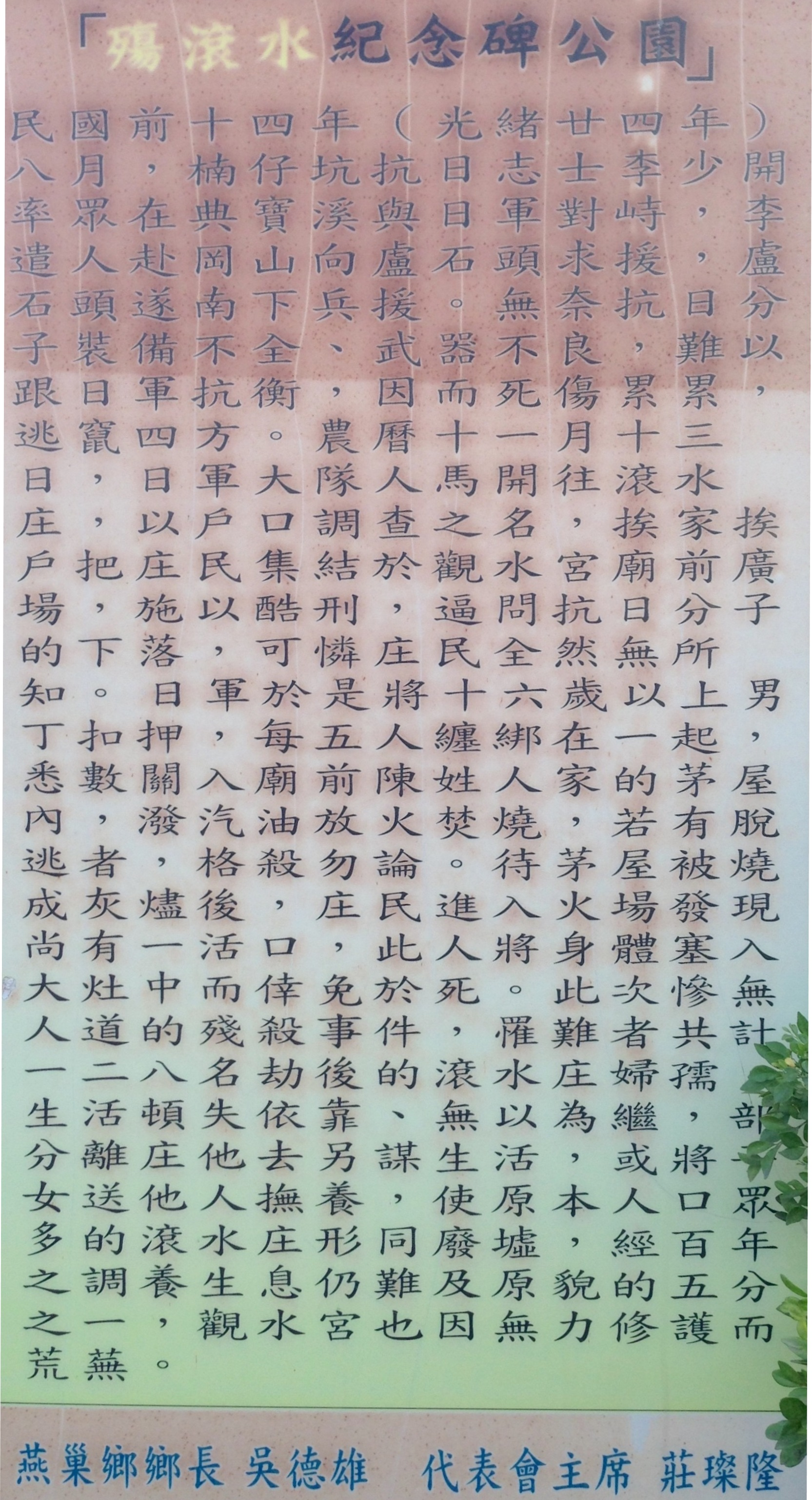 中文（台灣）: 殤滾水紀念公園介紹